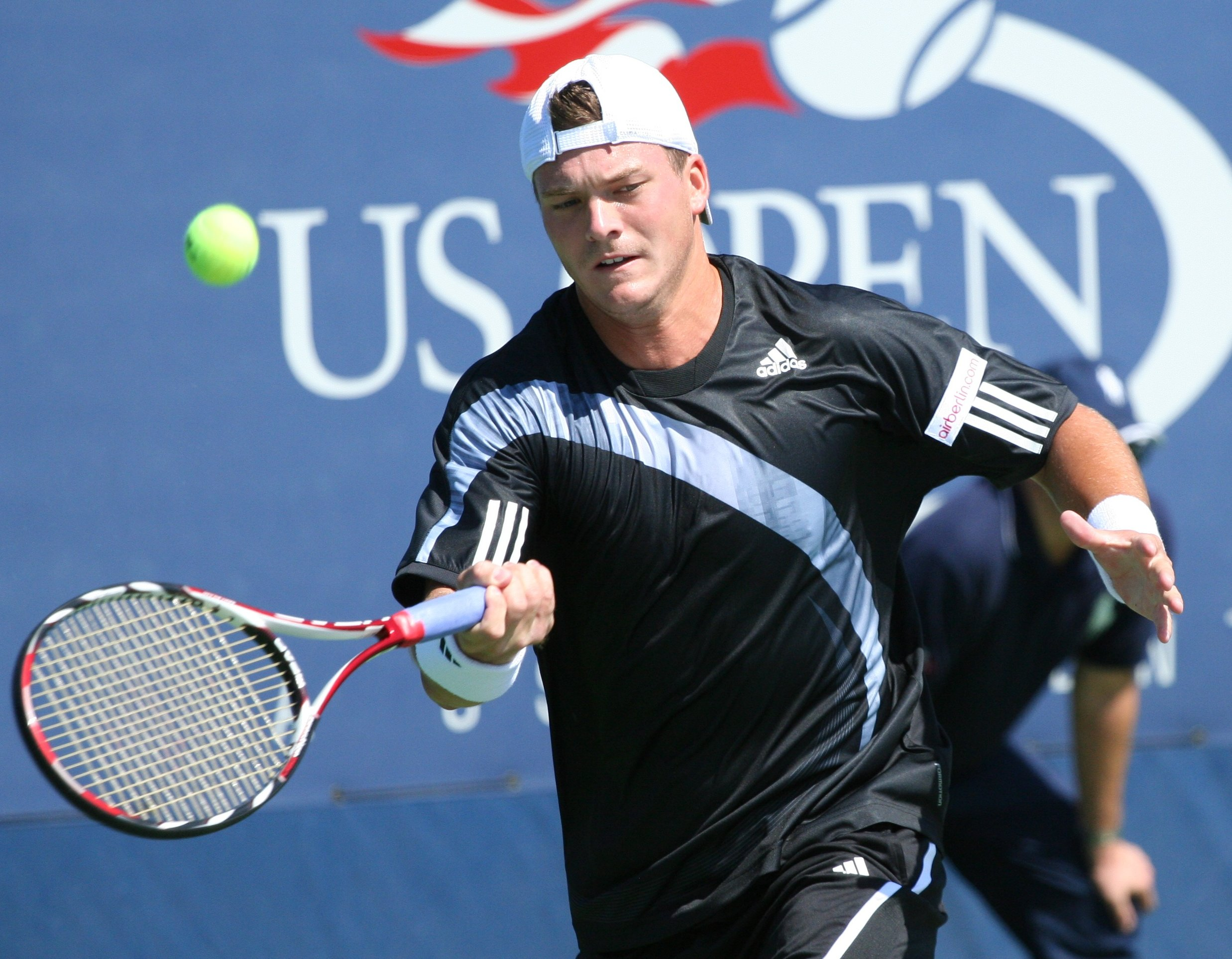 U.S. Open Wednesday, Sept. 2, 2009